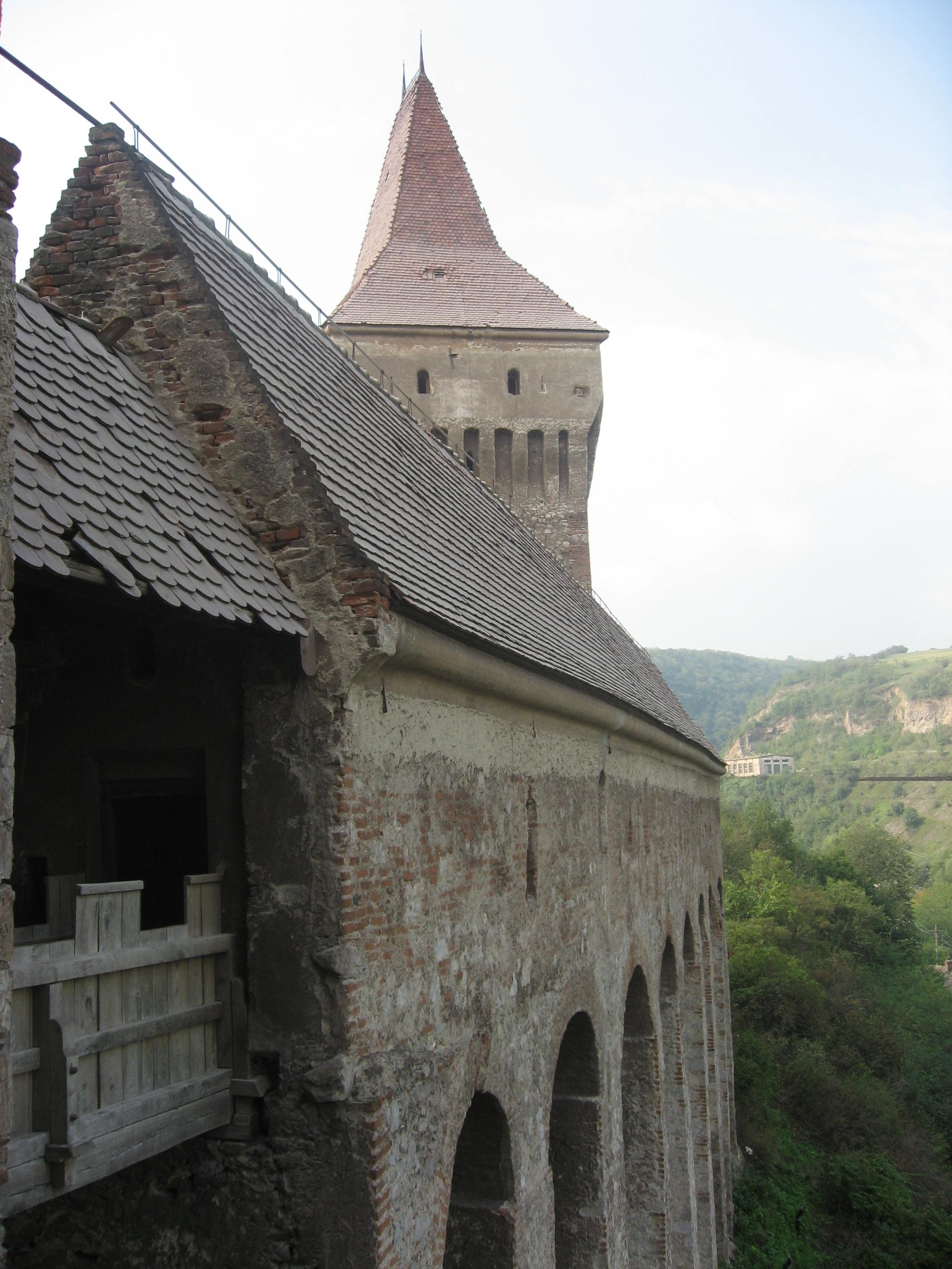 Hrad Hunedoara